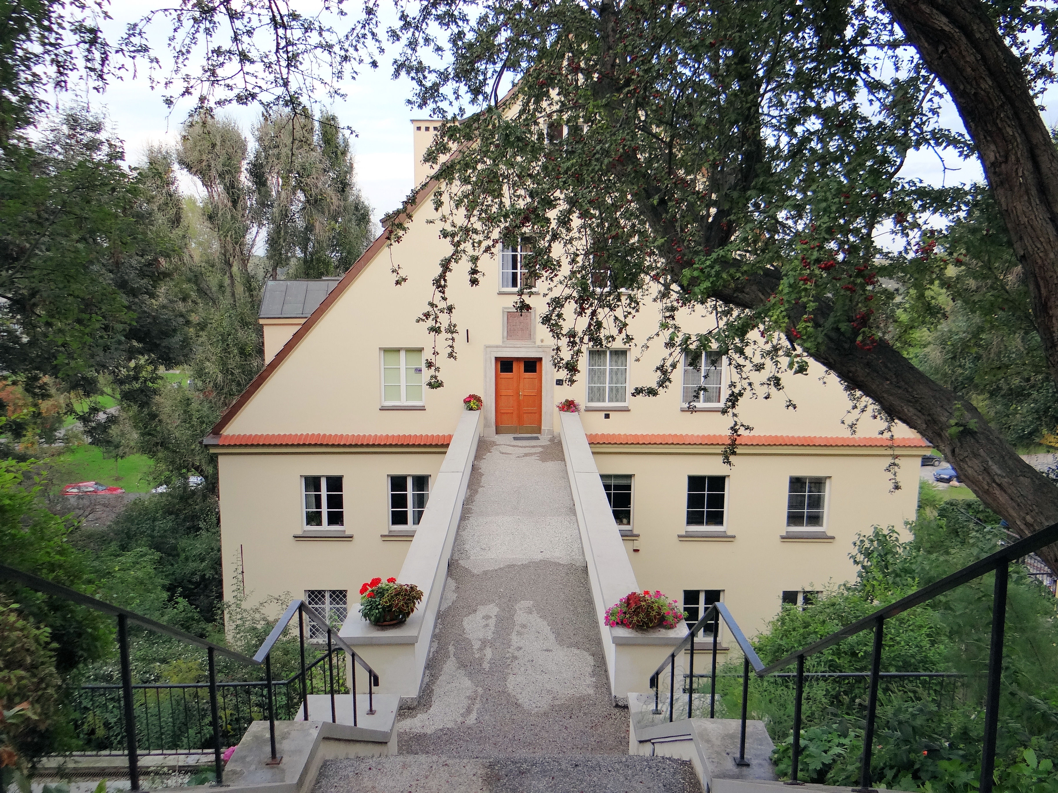 Dom z XVII-XVIII w, po wojnach odbudowywany raz w 1920r, drugi raz w 1959. Podwórze i ogród od ulicy oddziela mur, a do budynku można miedzy innymi dostać się po kładce z ulicy Brzozowej.